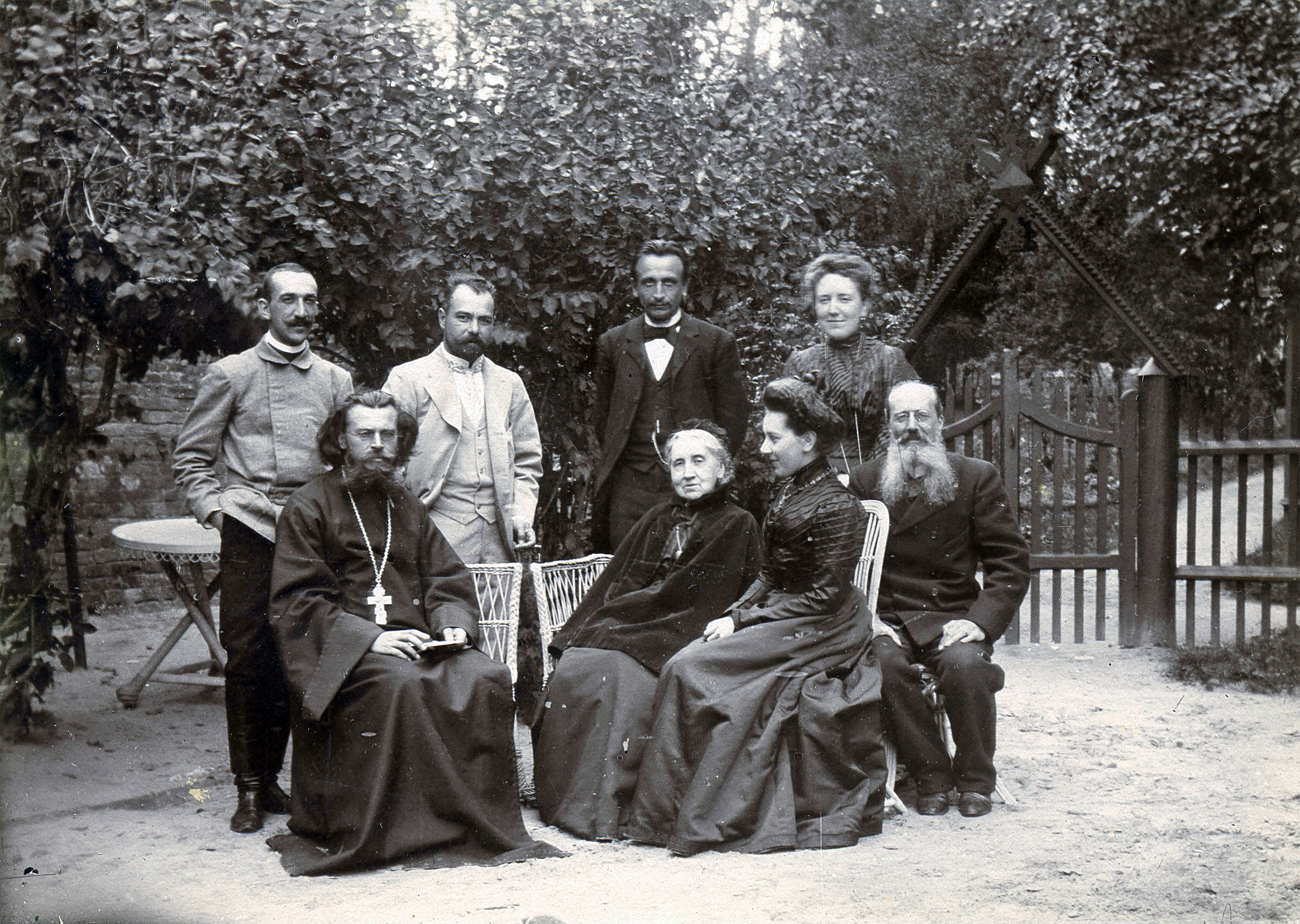 Тютчевы и их гости у главного усадебного дома: Стоят (справа налево): Софья Ивановна Тютчева (внучка поэта), неизвестный, Евгений Николаевич Погожев (Поселянин), Фёдор Иванович Тютчев (внук поэта) Сидят (справа налево): Иван Фёдорович Тютчев (сын поэта), Екатерина Ивановна Тютчева (внучка поэта), Ольга Николаевна Тютчева (в девичестве Путята), священник Иоанн Добросердов (впоследствии епископ Димитрий).